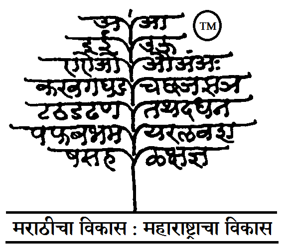 मुद्रा